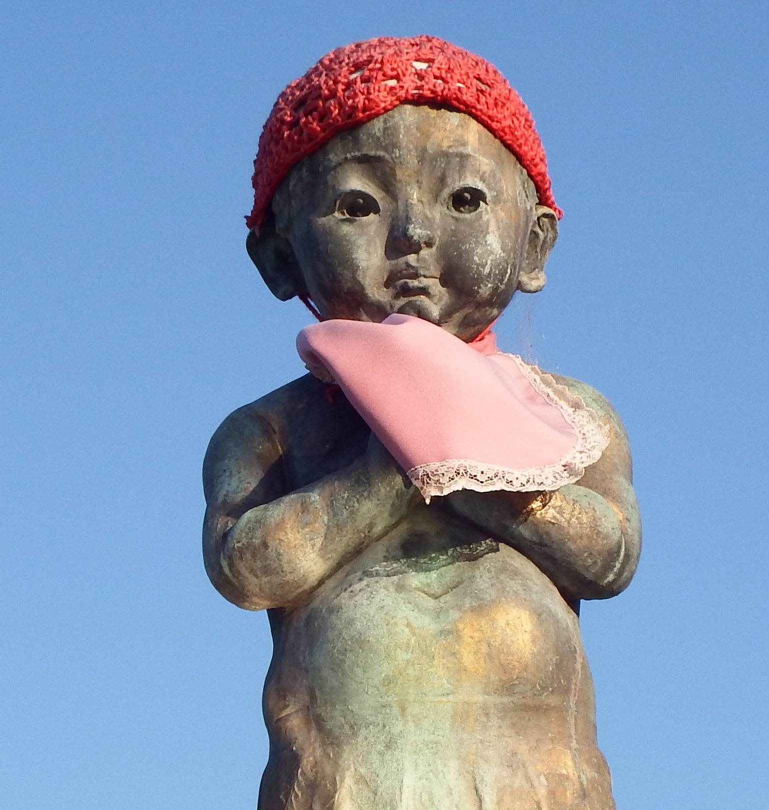 道隆寺の稚児大師